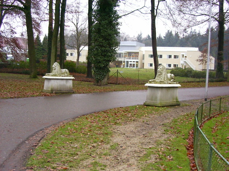 De leeuwen aan het begin van de Grotelaan